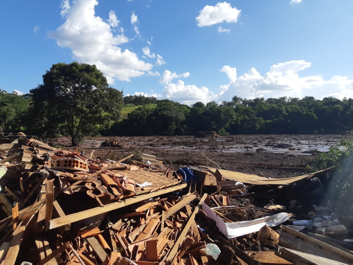 Fotografia das consequências da ruptura da barragem em Brumadinho, 2019.